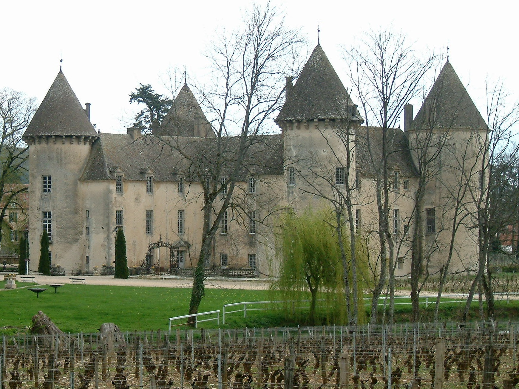 Château de Savigny-lès-Beaune, Bourgogne, FRANCE